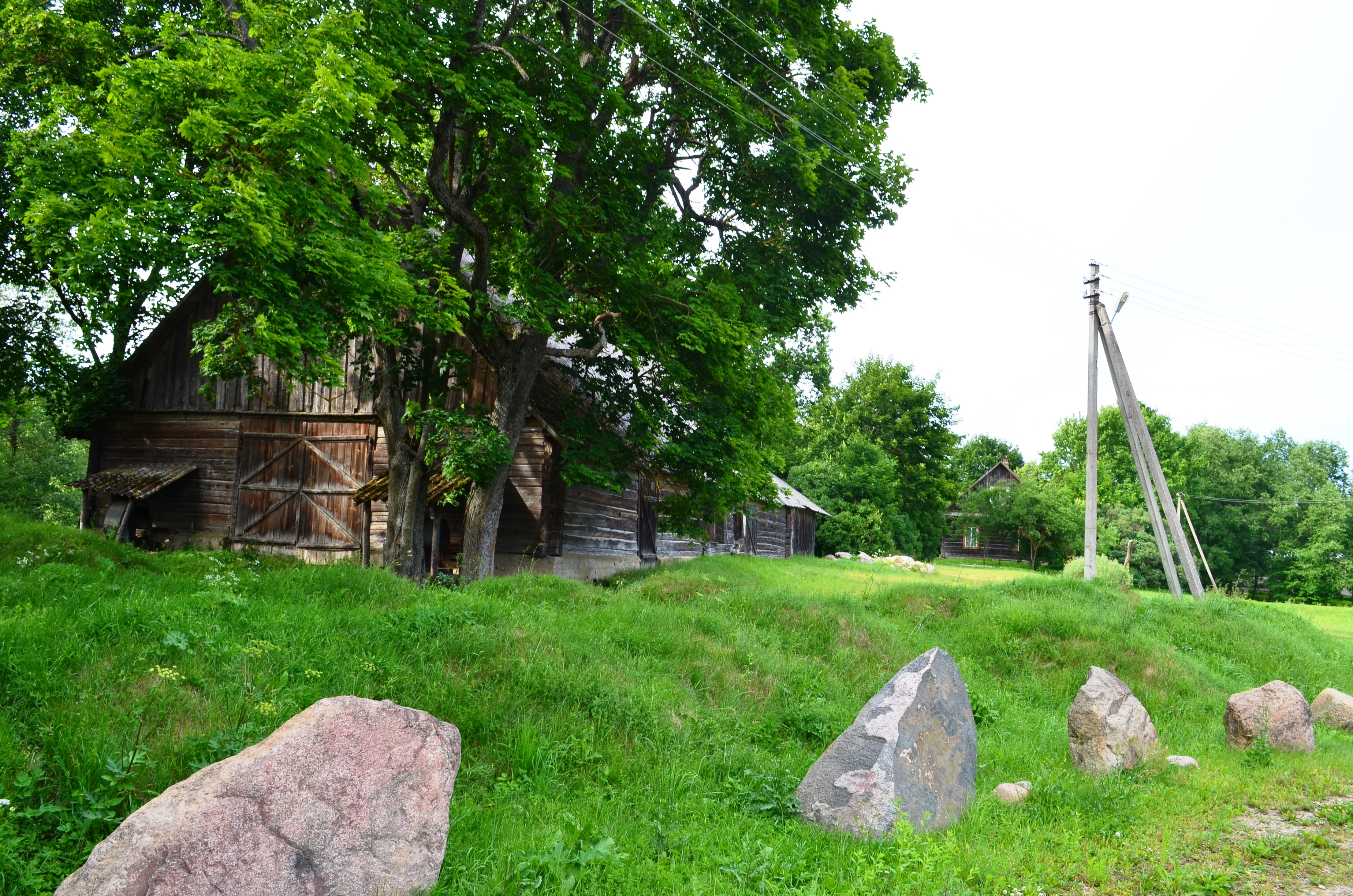 Seno sodyba, Kalinas, Vilniaus raj.